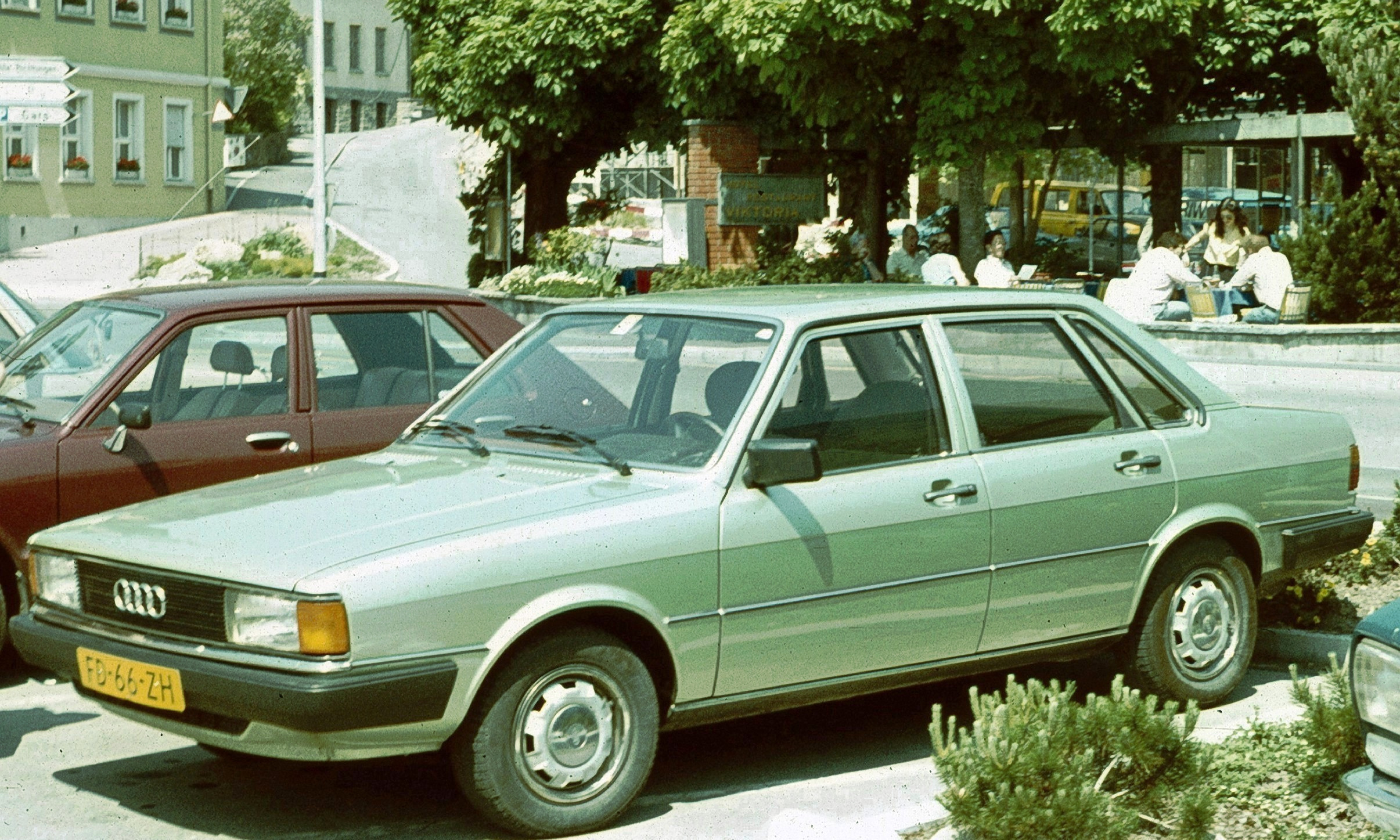 Audi 80 near Luzern